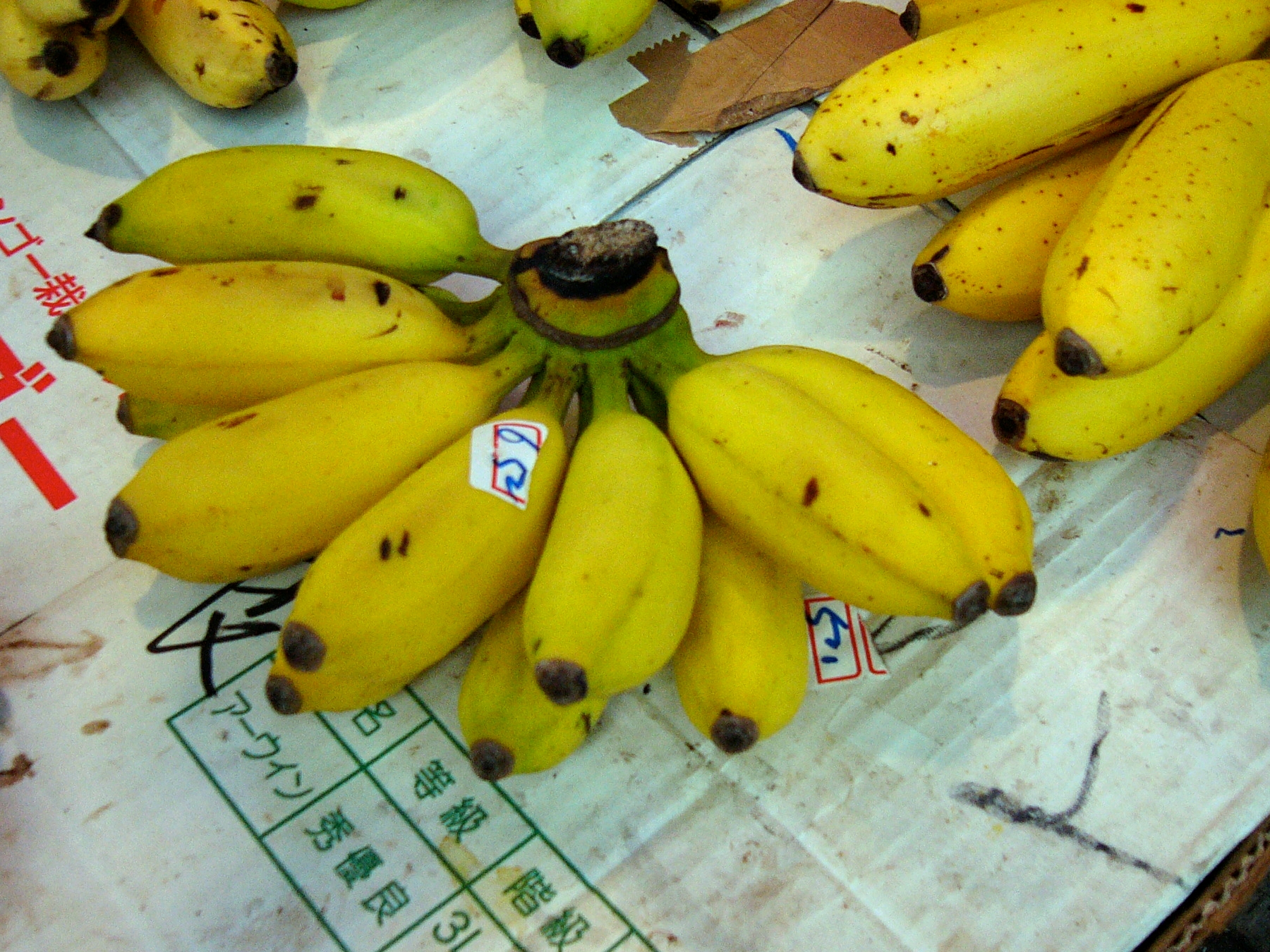 Okinawa Shima Banana in Makishi market, Naha